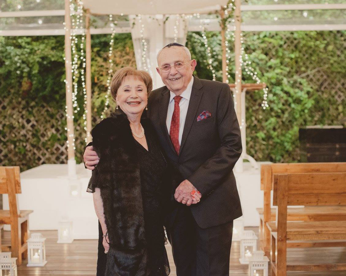 שמואל בוגלר ואשתו, שושנה בוגלר.